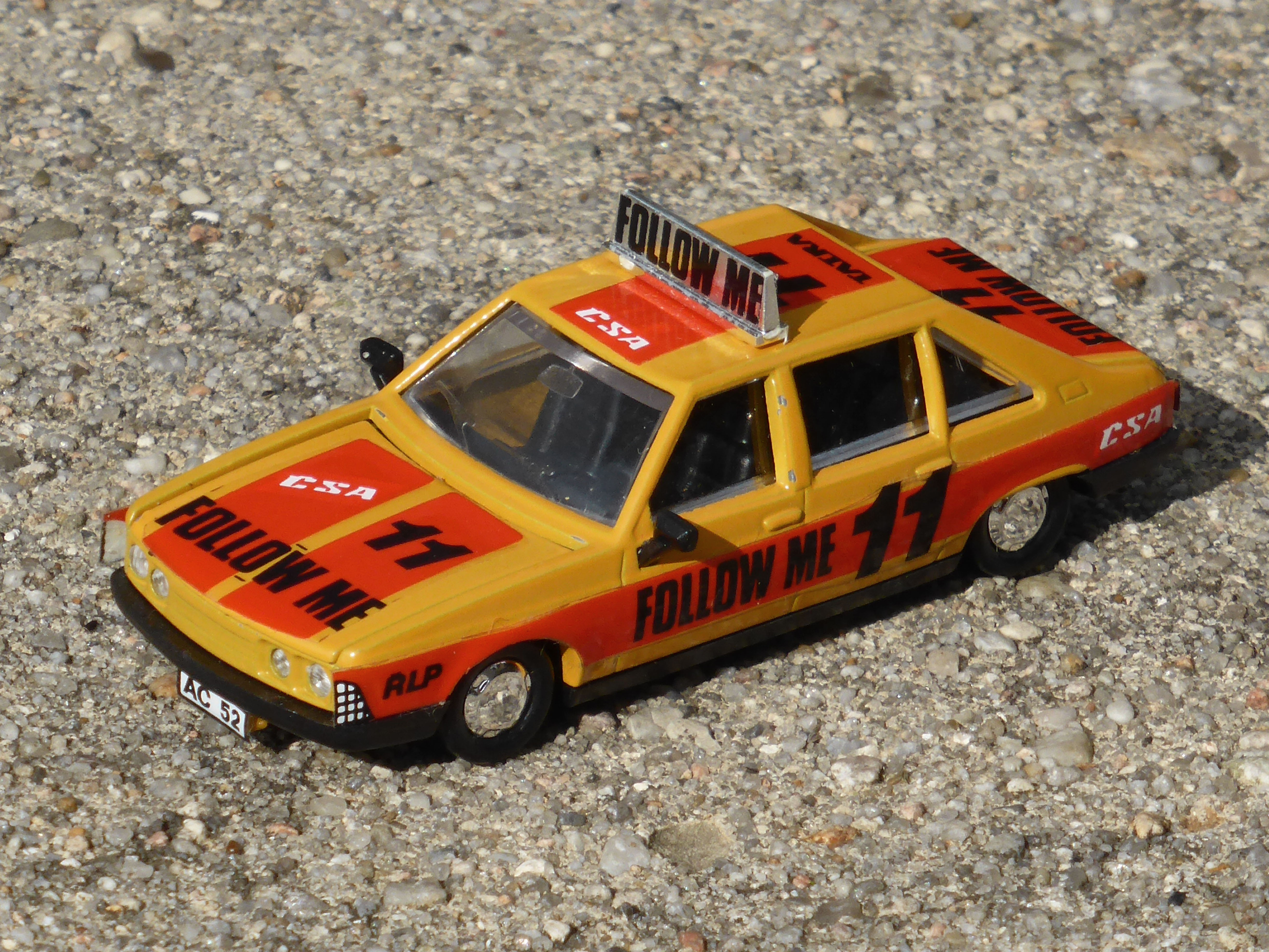 Modellauto "Tatra 623" im Maßstab 1:48 von "Monti Metal".